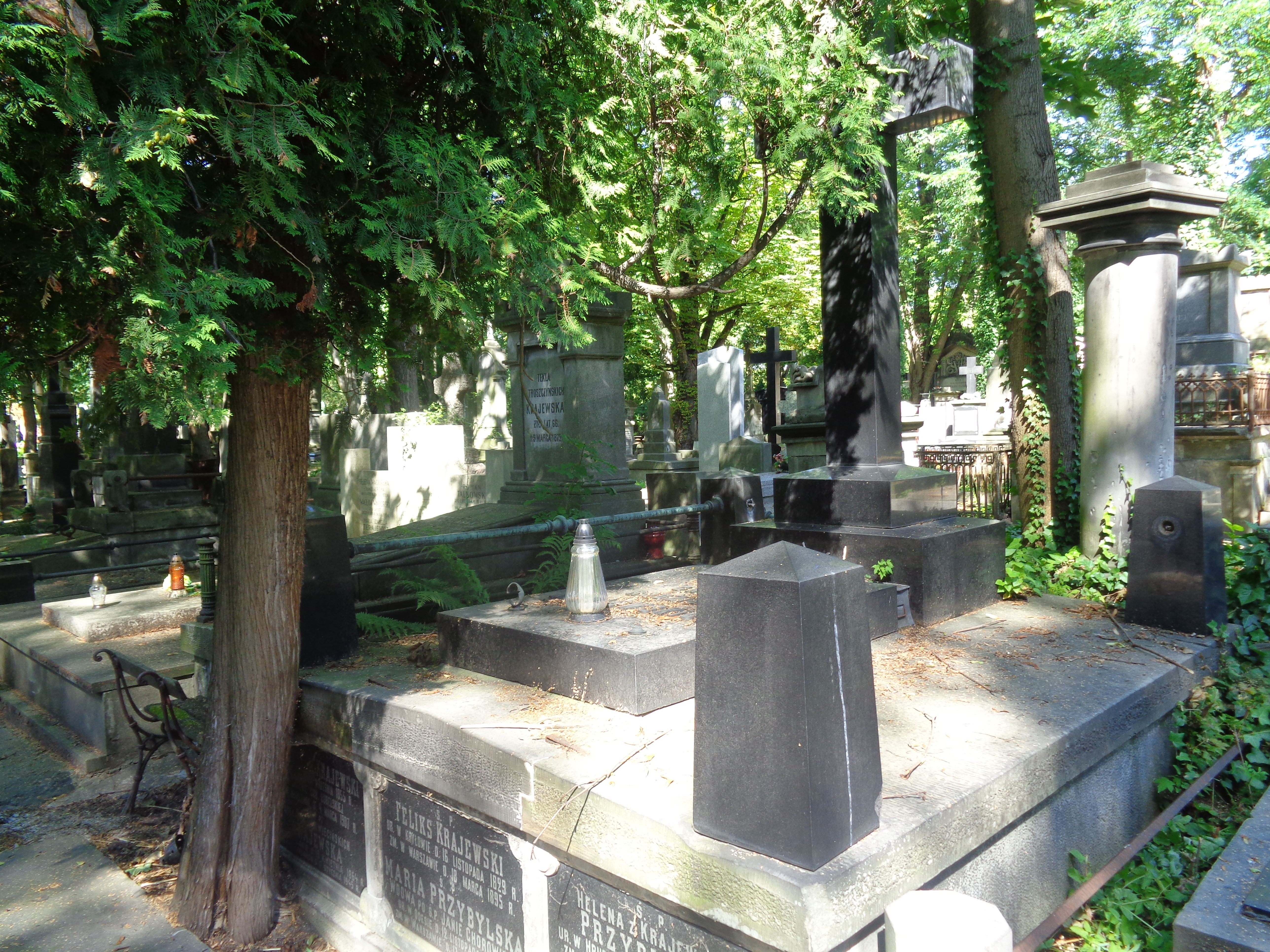 Grób Władyslawa Krajewskiego na Cmentarzu Powązkowskim